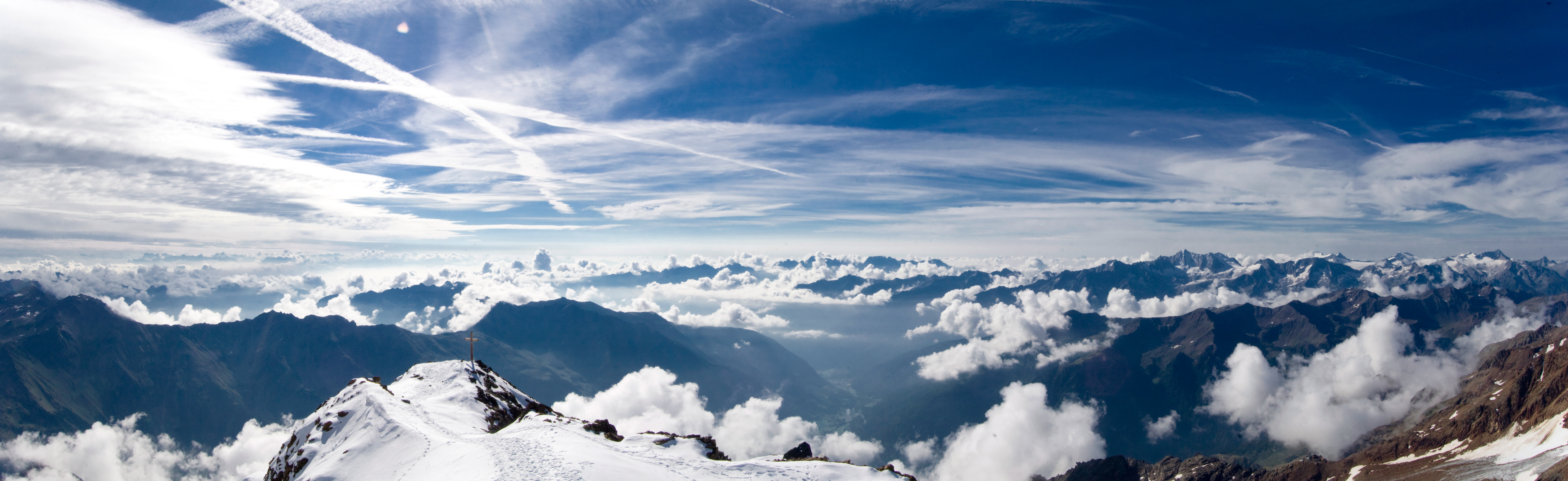 Veduta panoramica dal Monte Vioz, sulla destra visibile il gruppo dell'Adamello